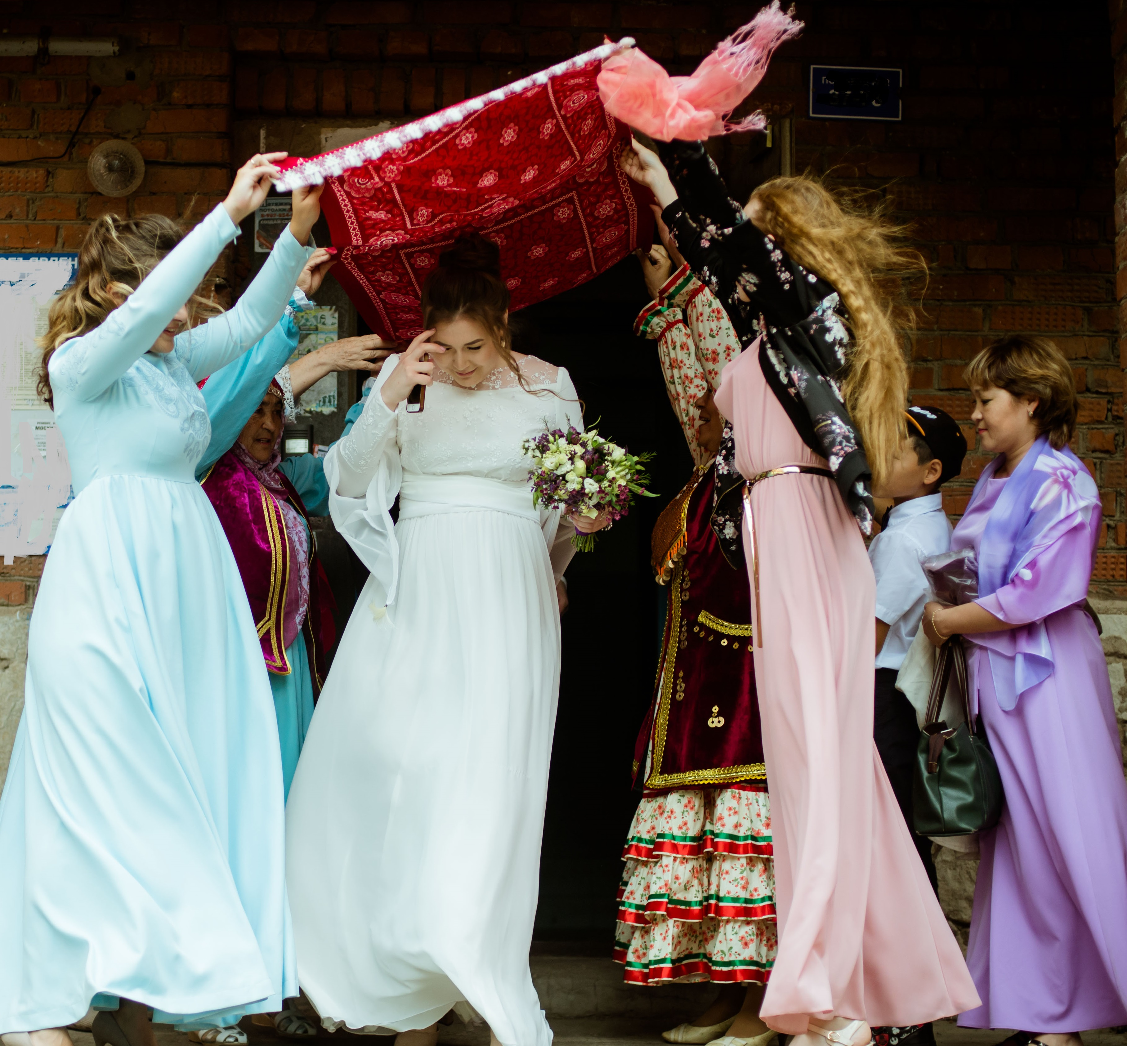 Башкирская свадьба. Проводы невесты